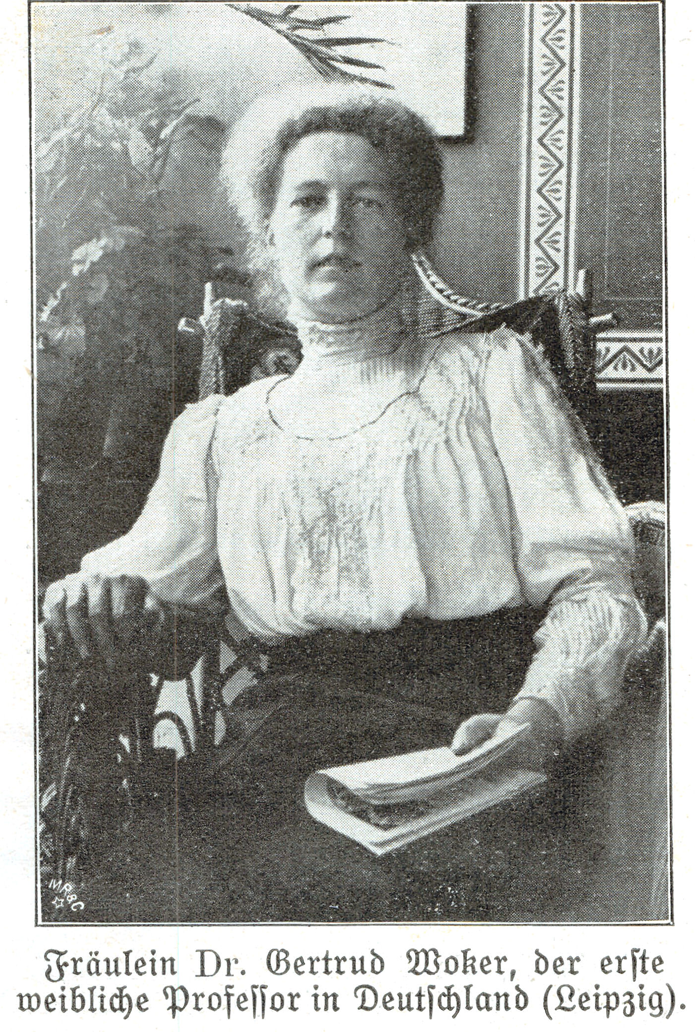 Gertrud Woker als "der erste weibliche Professor in Deutschland" 1911.